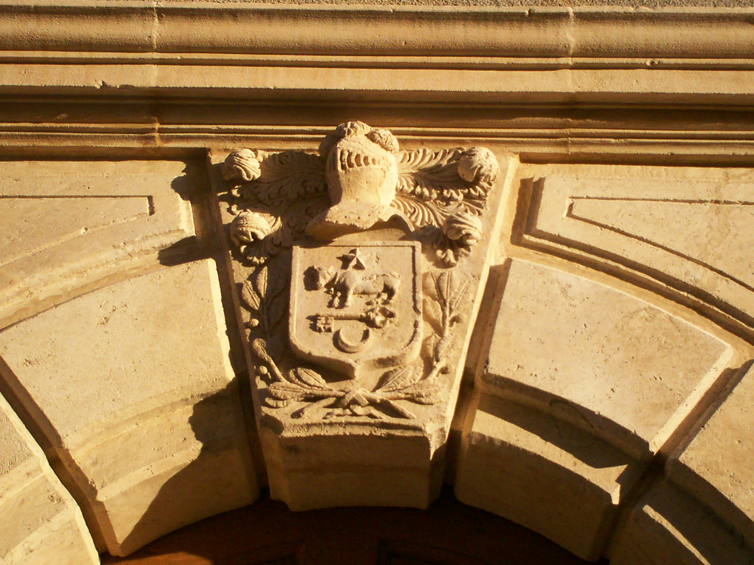 Blason sur clef d'arc à Saint Saturnin les Apt, Vaucluse, France